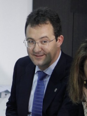 Comité de Dirección PP Madrid en Leganés